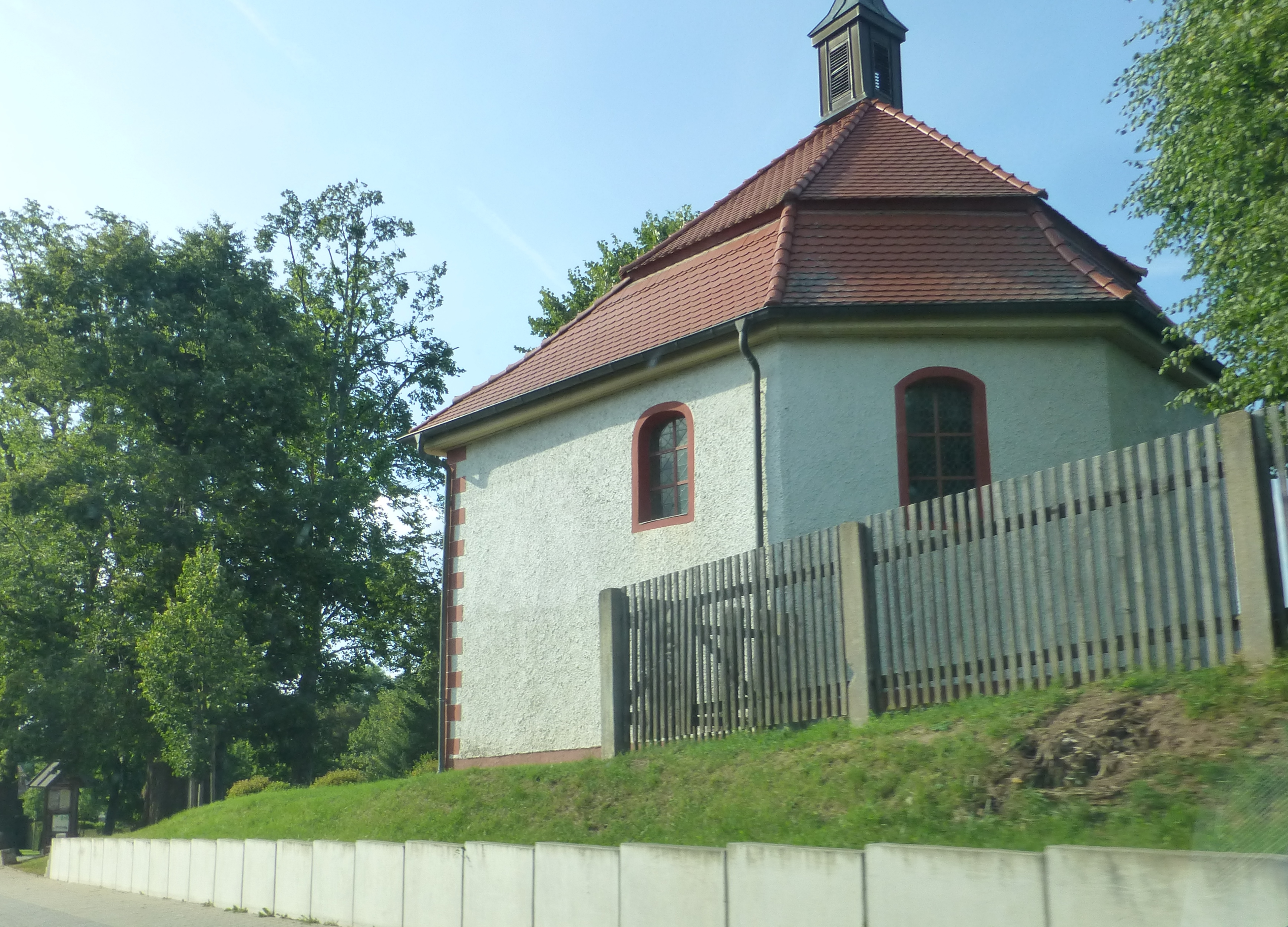 Ignatiuskapelle in Wingerode